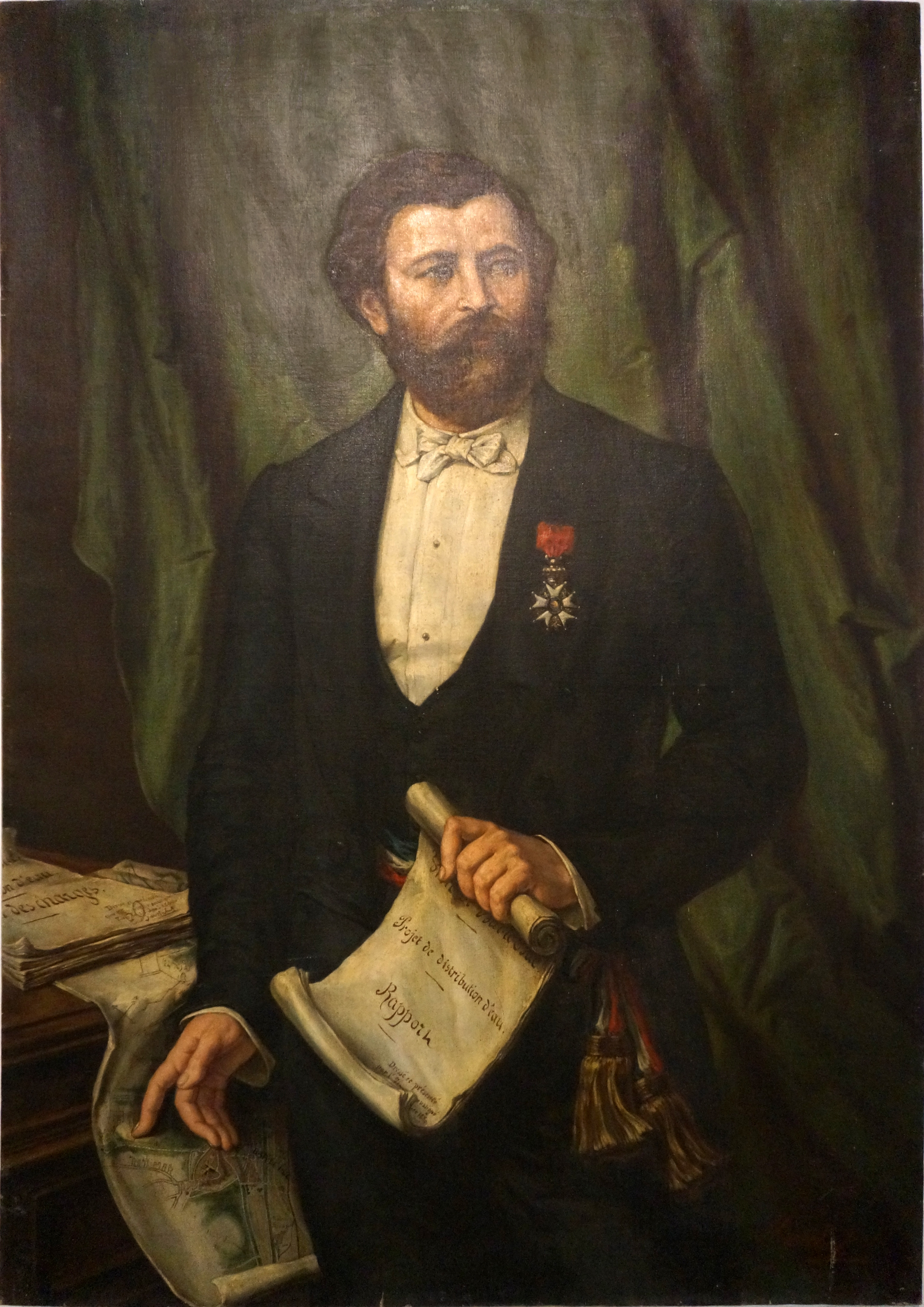 ernest Bradfer peint par CL Maréchal .